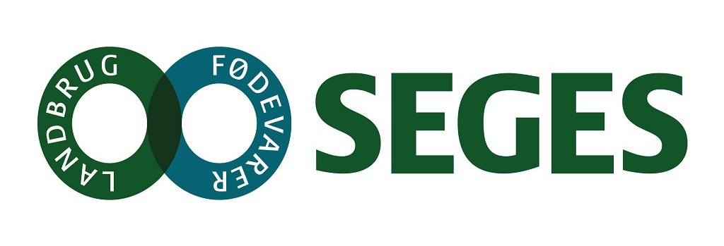 SEGES logo